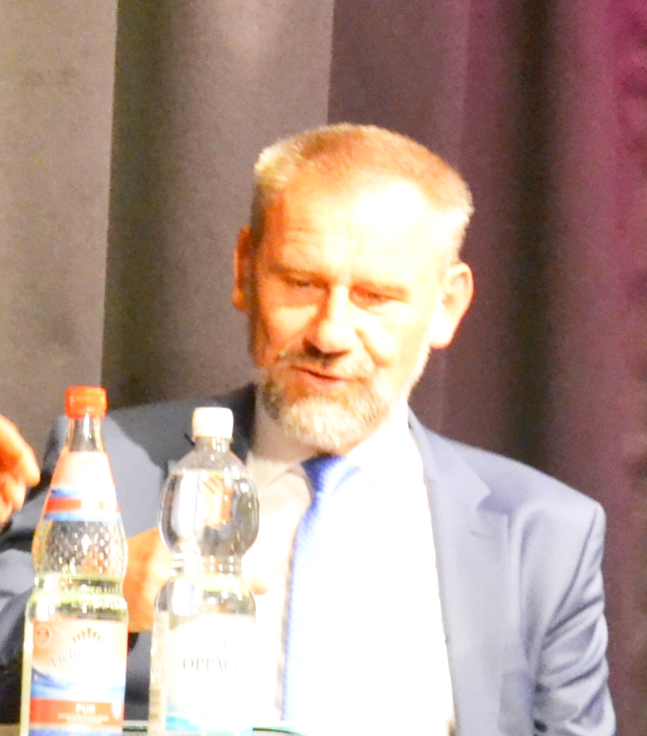 Marko Schiemann auf der Diskussion der Landeszentrale der Politischen Bildung im Steinhaus Bautzen, anlässlich der Landtagswahl 2019 in Sachsen